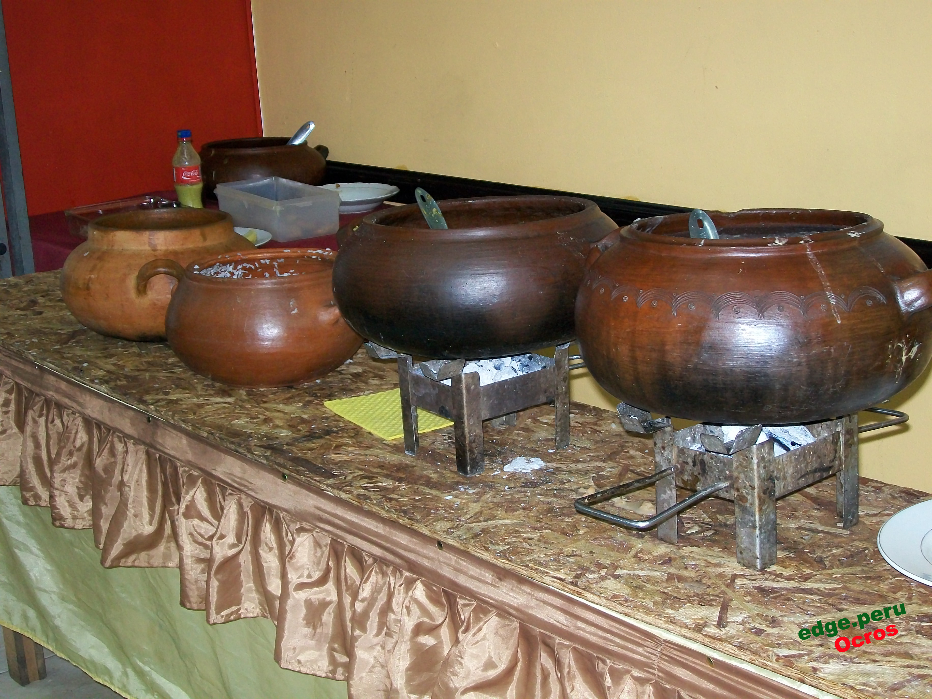 Ollas usadas en la gastronomía.